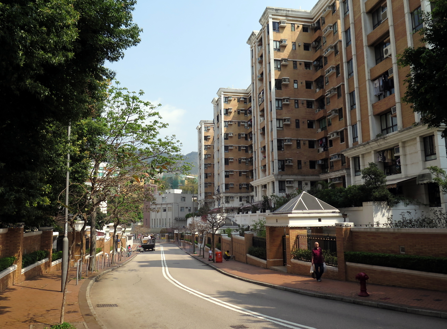 Grandeur Road, Kowloon Tong